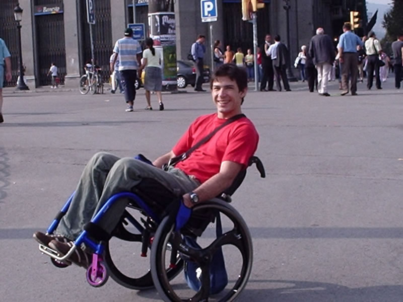 Por Barcelona